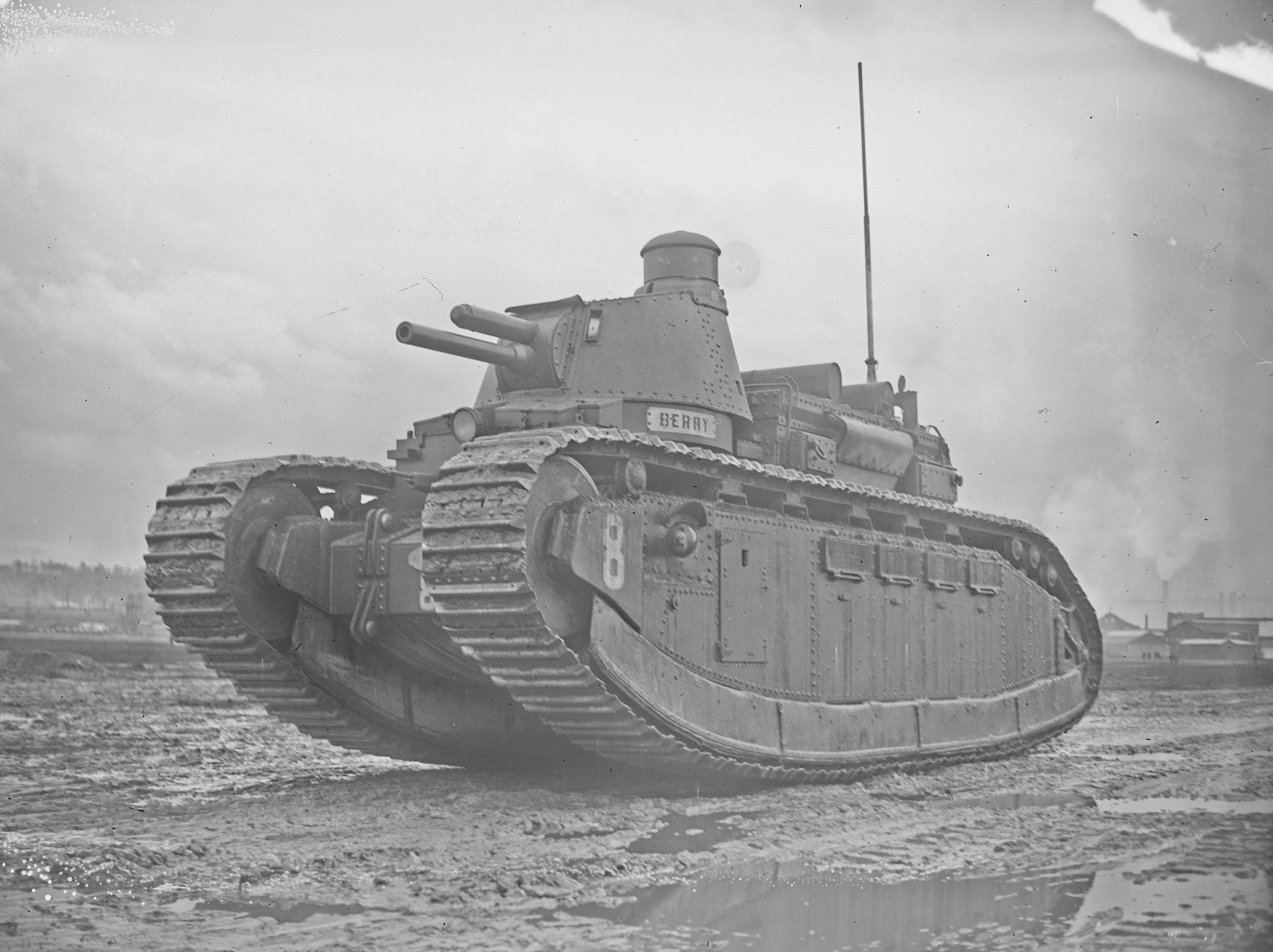 Issy-les-Moulineaux, 31/3/28, manoeuvres de chars d'assaut : [photographie de presse] / [Agence Rol] This image comes from Gallica Digital Library and is available under the digital ID btv1b53197676j This tag does not indicate the copyright status of the attached work. A normal copyright tag is still required. See Commons:Licensing.